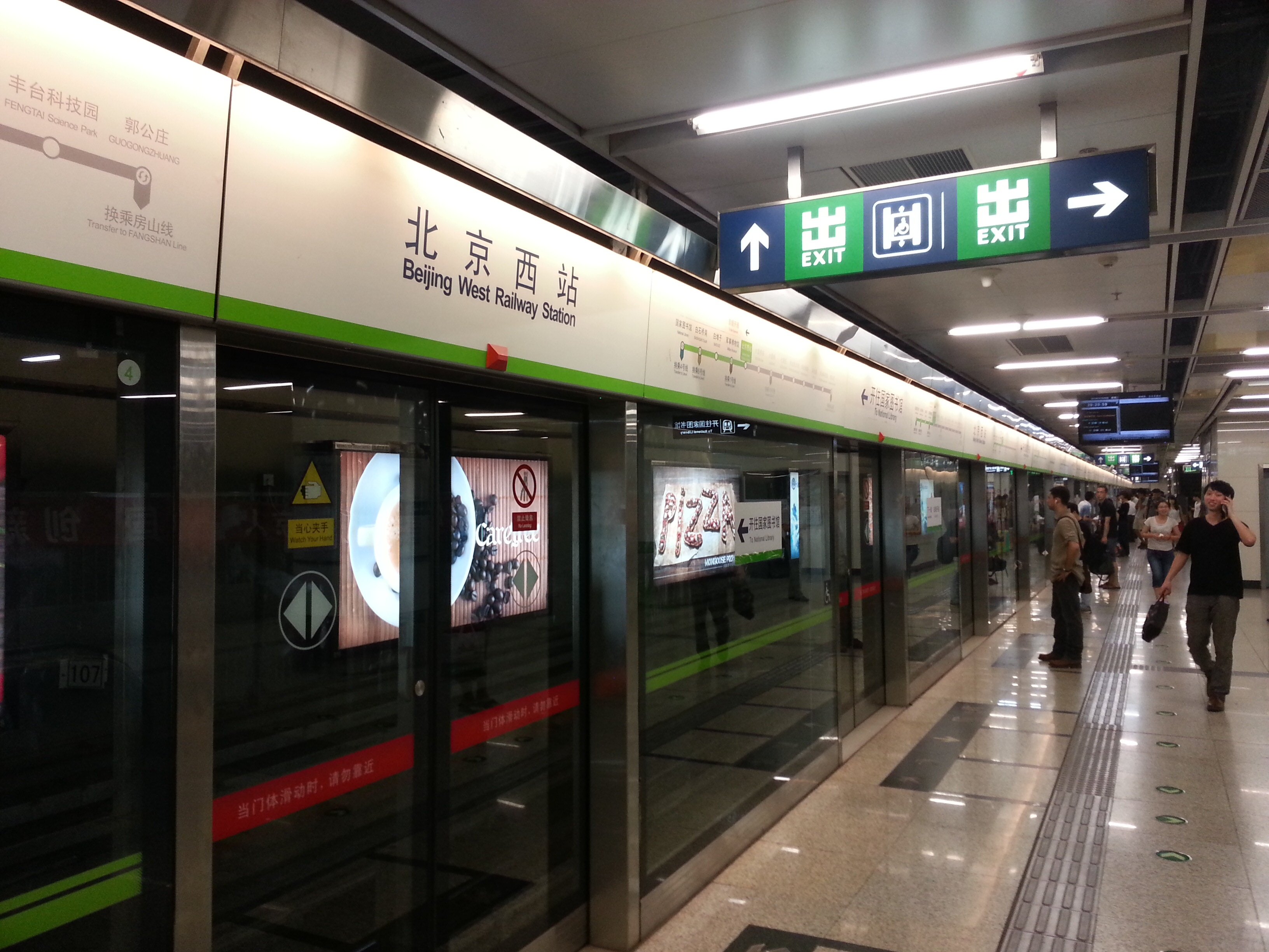 北京西站地铁屏蔽门